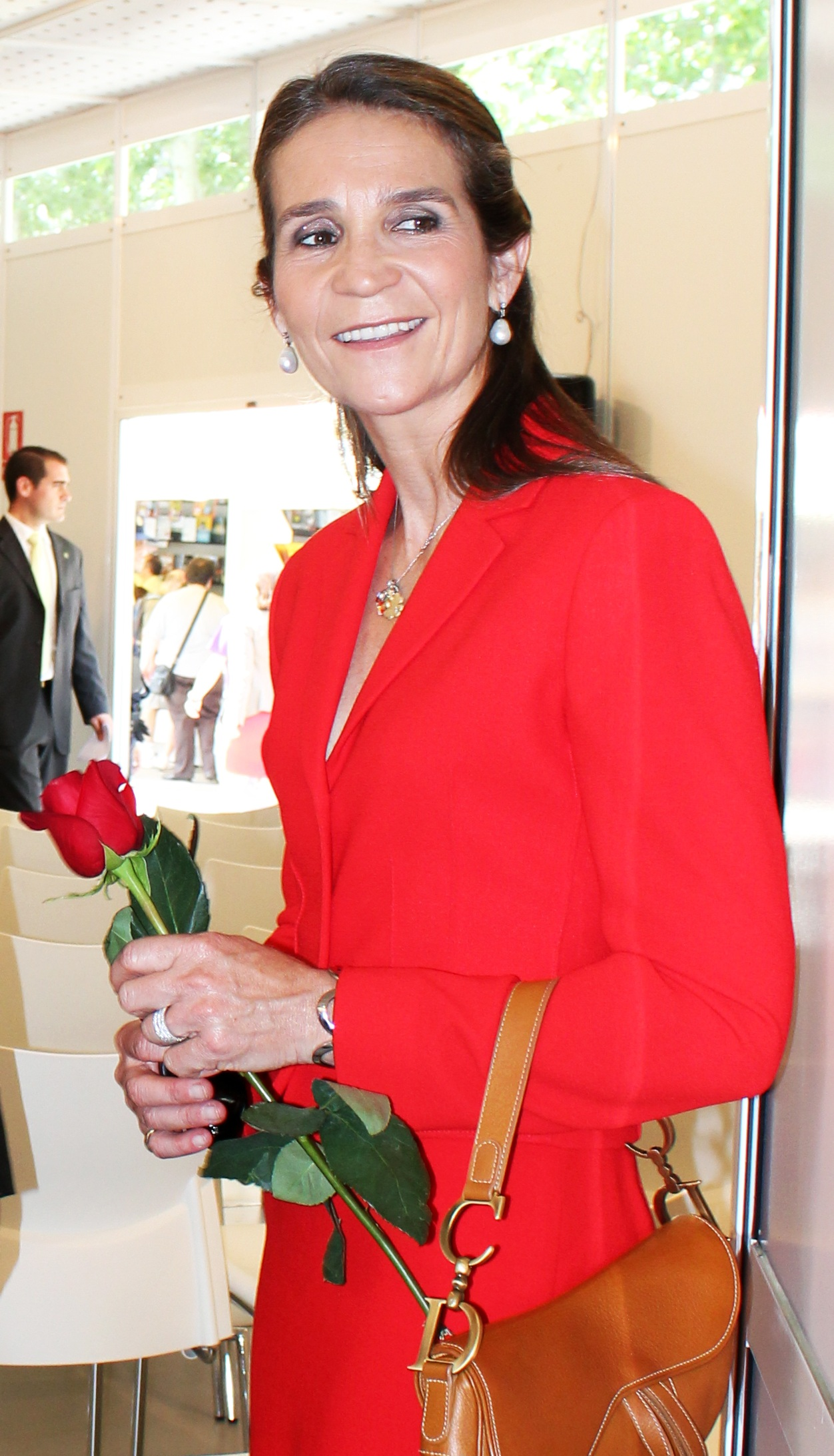 Hélène, infante d’Espagne et duchesse de Lugo lors de la « Feria de Libro » de 2011, une rose à la main.